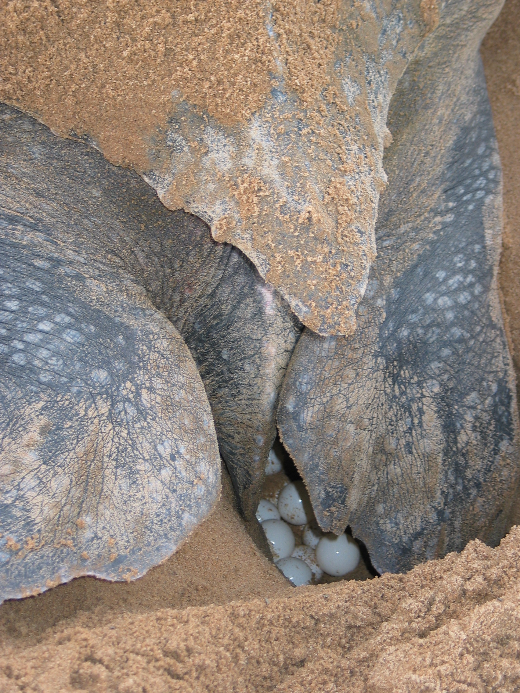 Ponte d'une tortue luth. Photo prise sur la plage de Montjoly (Guyane).